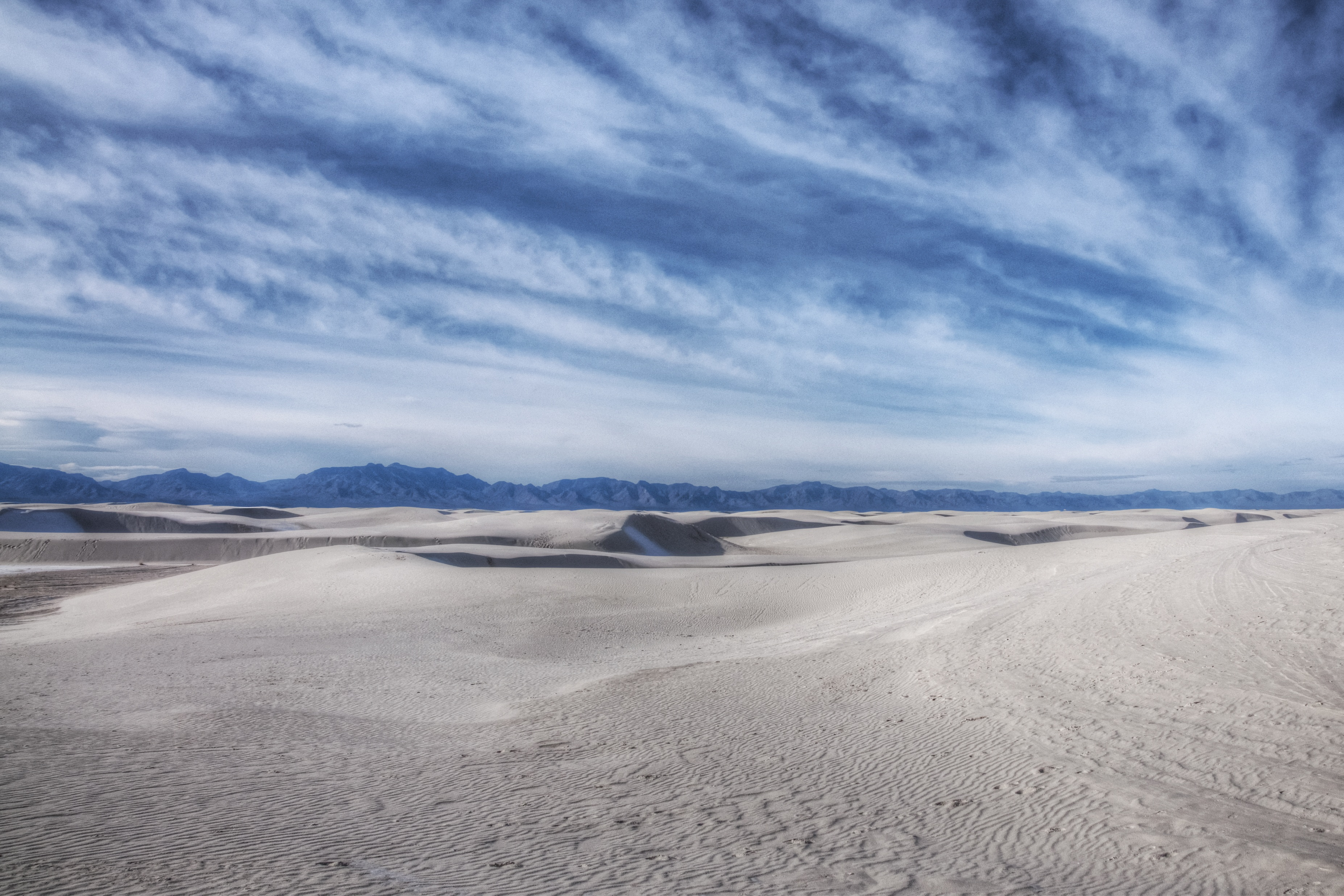 2009年12月30日、アメリカ合衆国ニューメキシコ州にあるホワイトサンズ・ナショナルモニュメント。710㎢に広がる硫酸カルシウム(石膏)からなる砂丘の中にある国定記念物。国立公園のように国から保護指定を受けています。 詳しくはナショナル・モニュメントについて(wikipedia)。 12/30/2009, White Sands National Monument, New Mexico, USA. This national monument is in a 275mi² or 710㎢ of white sands dunes composed of gypsum crystal in the West part of the state.